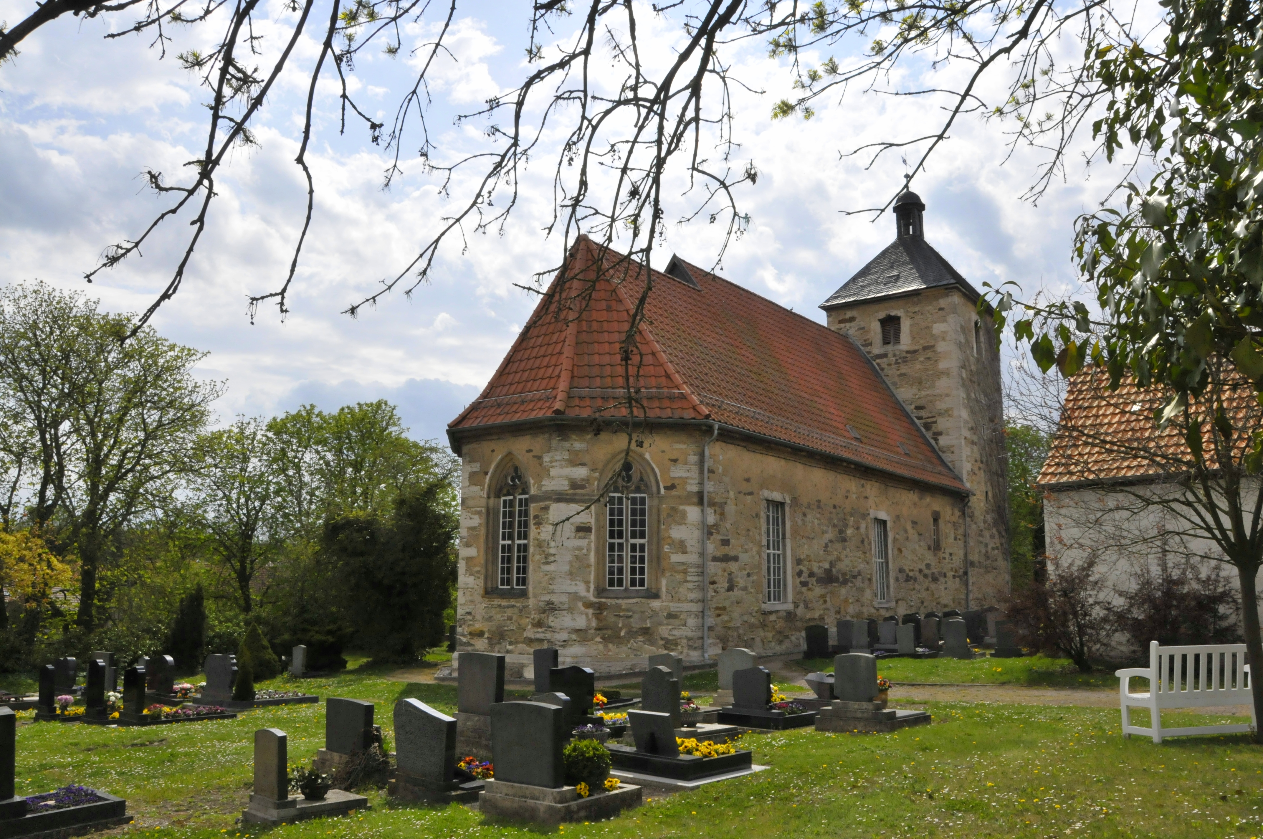 Illeben, Kirche, NO-Seite